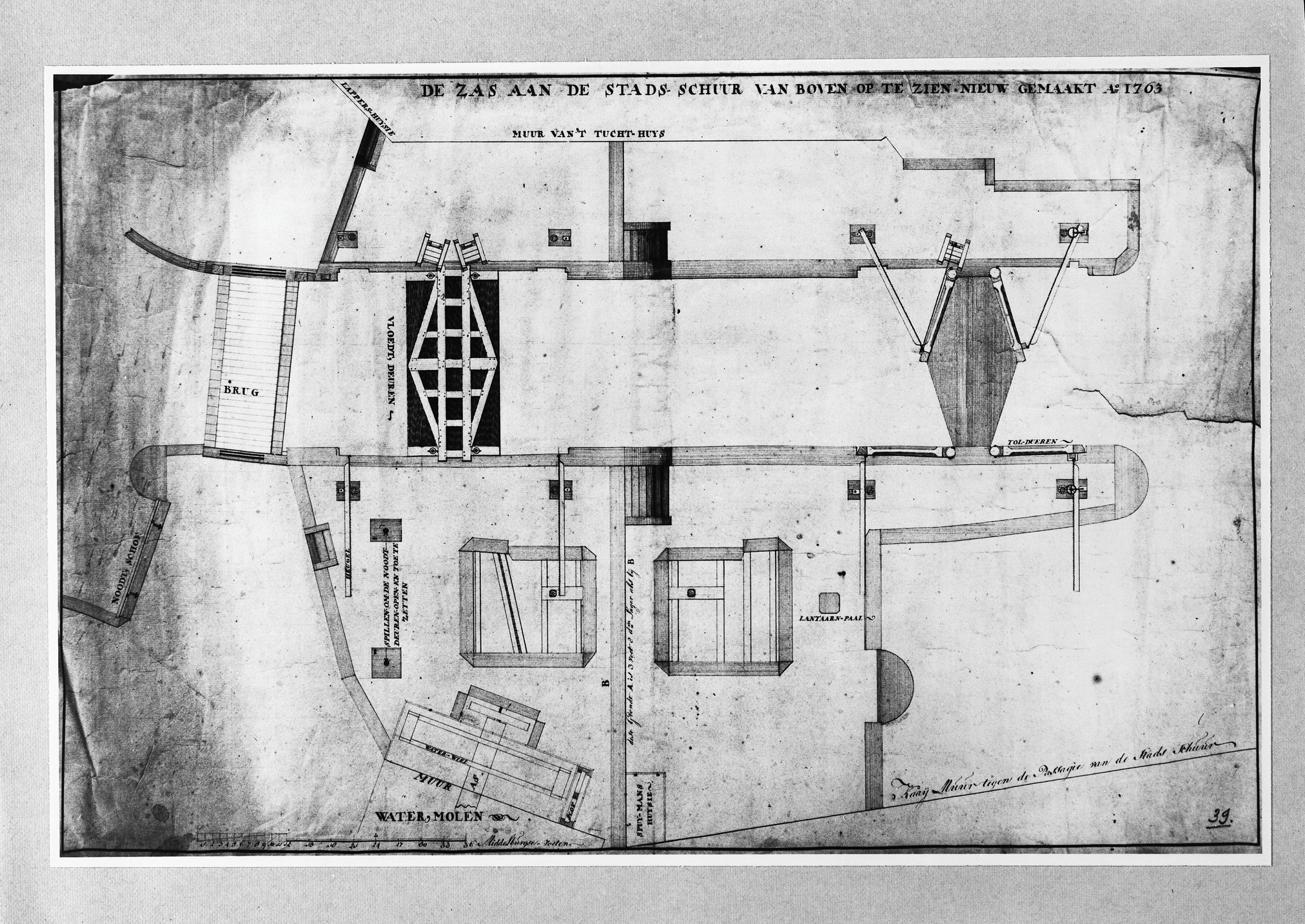 Sluis: Sluis bij de Stadsschuur, plattegrondtekening (opmerking: Reproductie van tekening in bezit van Gemeentewerken Middelburg)